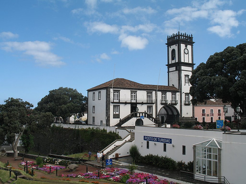 Ribeira Grande - Azores